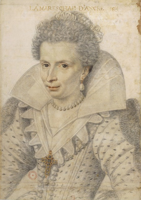 Leonora Galigaï, maréchale d'Ancre.